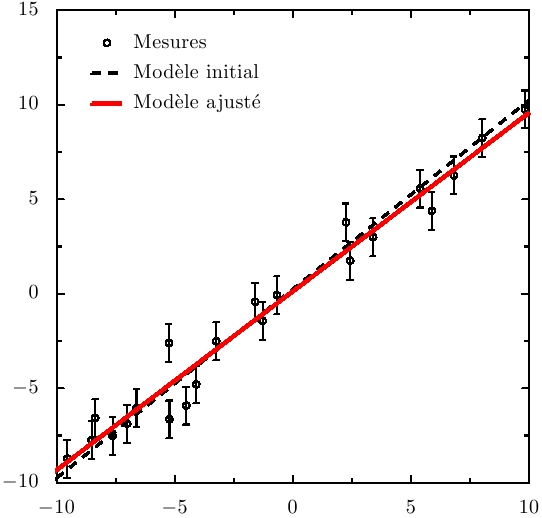 Ajustement d'une loi du type y=a*x+b sur des donnees entachees d'erreurs gaussiennes